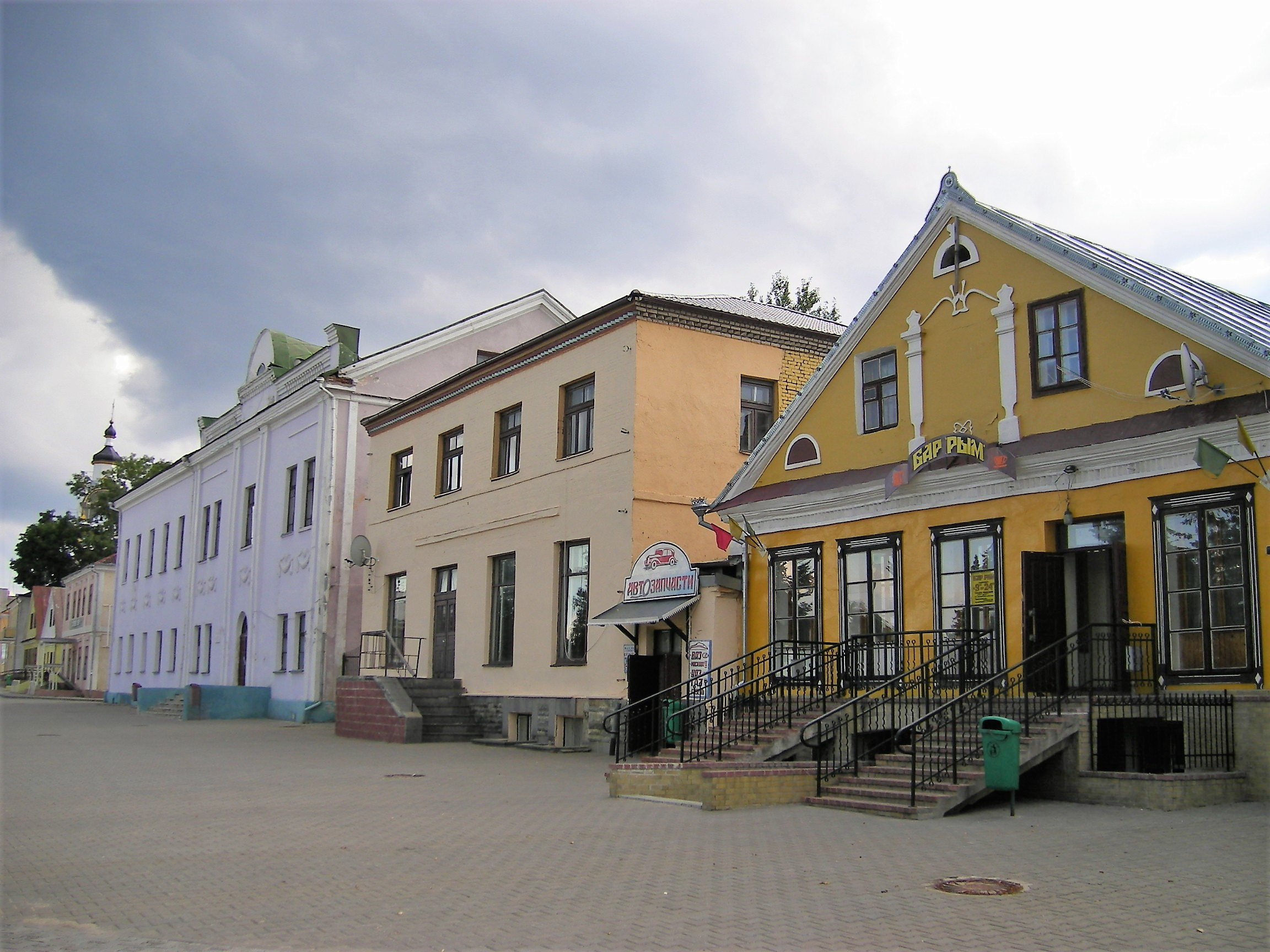 Navahrudak, Lenin square